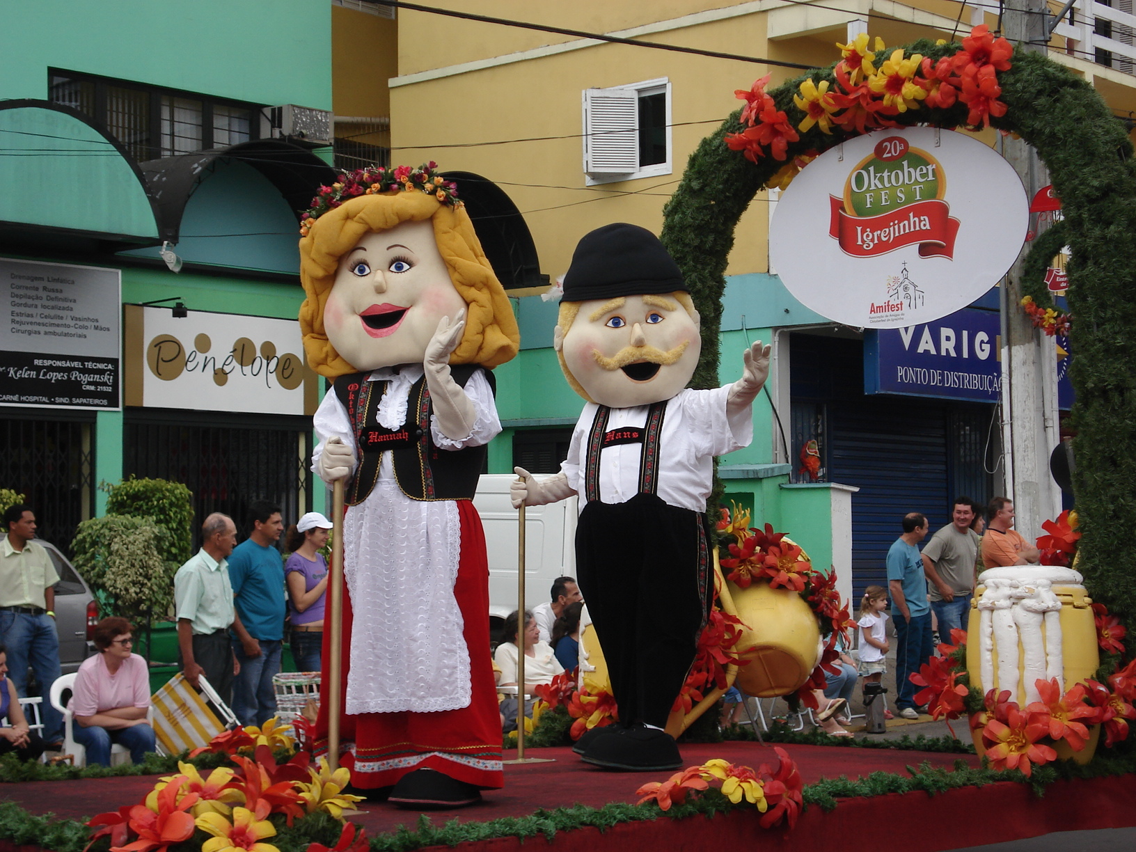 Hanz e Hannah no esfile da 19ª Pktoberfest de Igrejinha